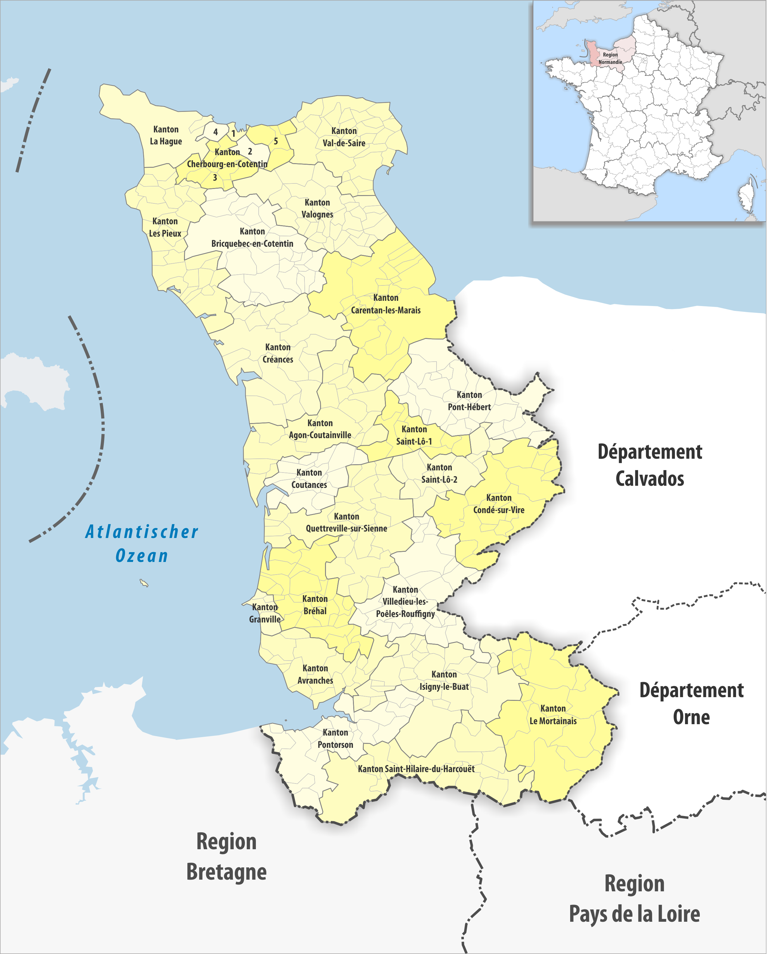 Gemeinden und Kantone im Departement Manche